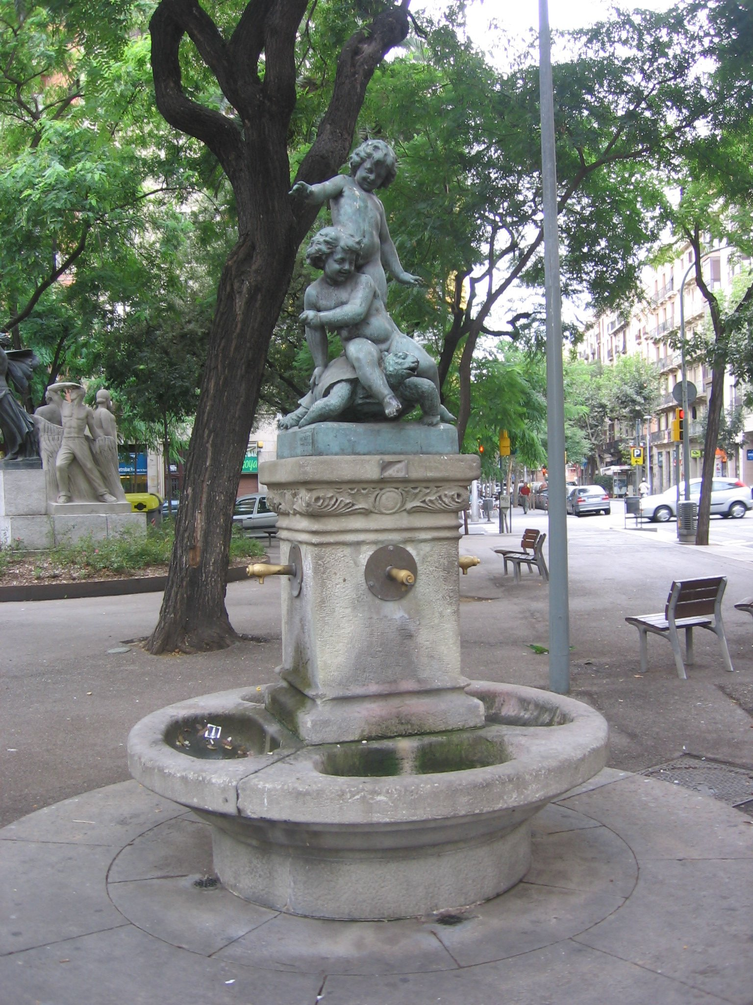 Fuente de la Tortuga, Barcelona.